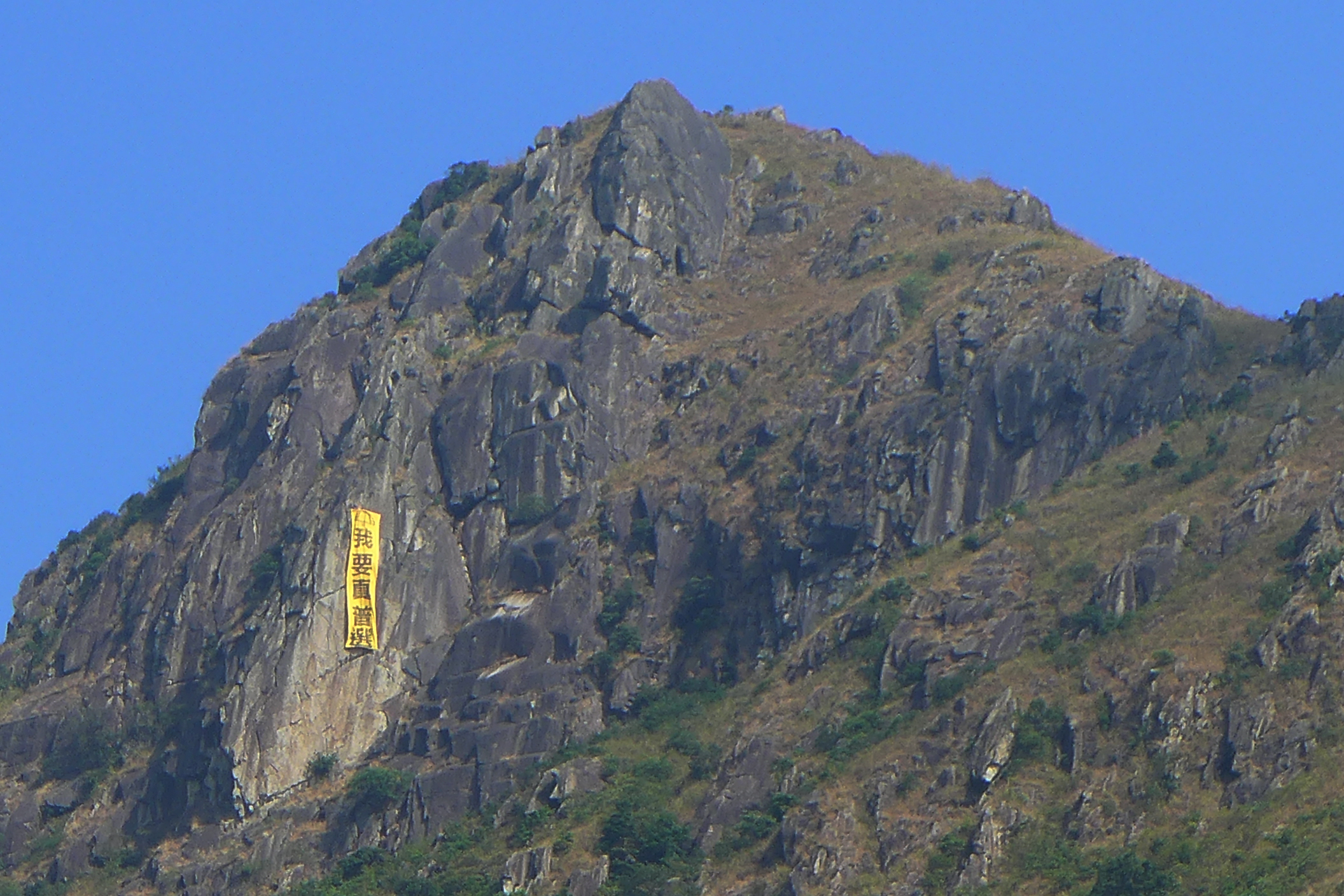 Kowloon Peak Umbrella Movement Banner